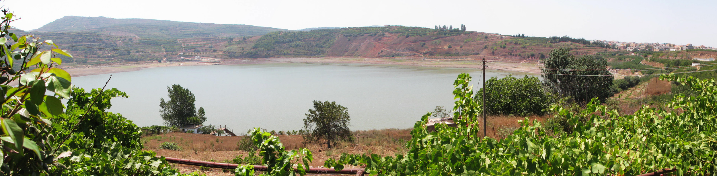 פנורמה של ברכת רם